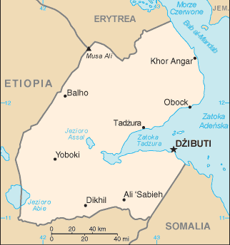 Mapa Dżibuti, wersja polska, z CIA World Factbook